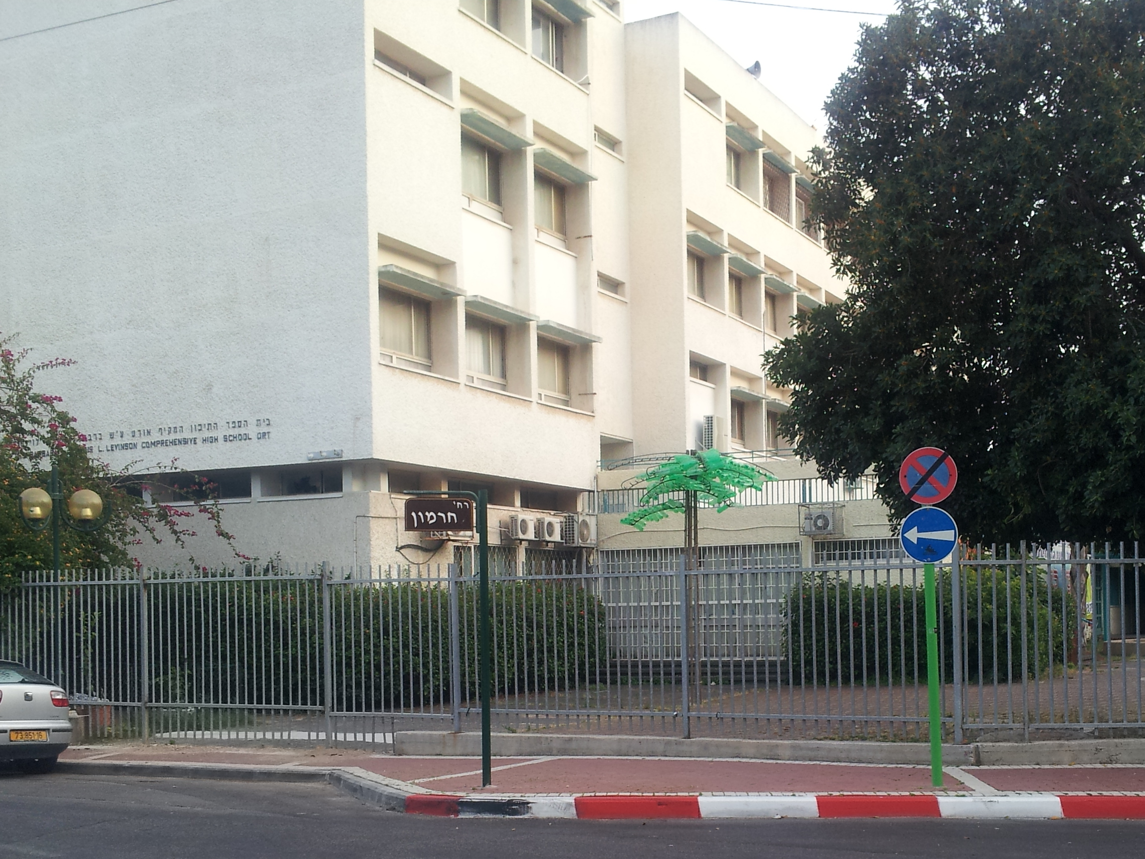 בית הספר אורט ביאליק